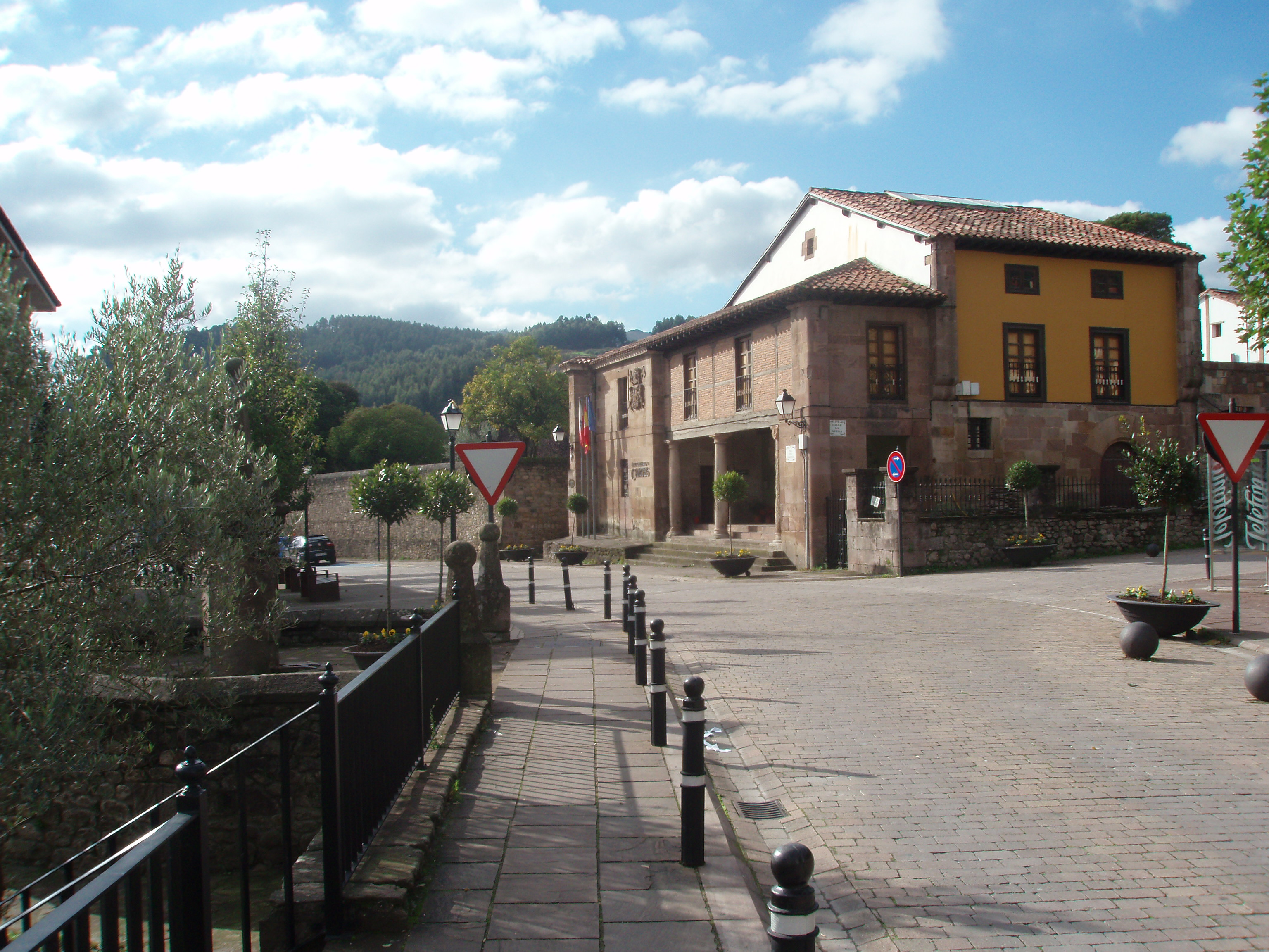 Casa consistorial de Cartes (Cantabria).